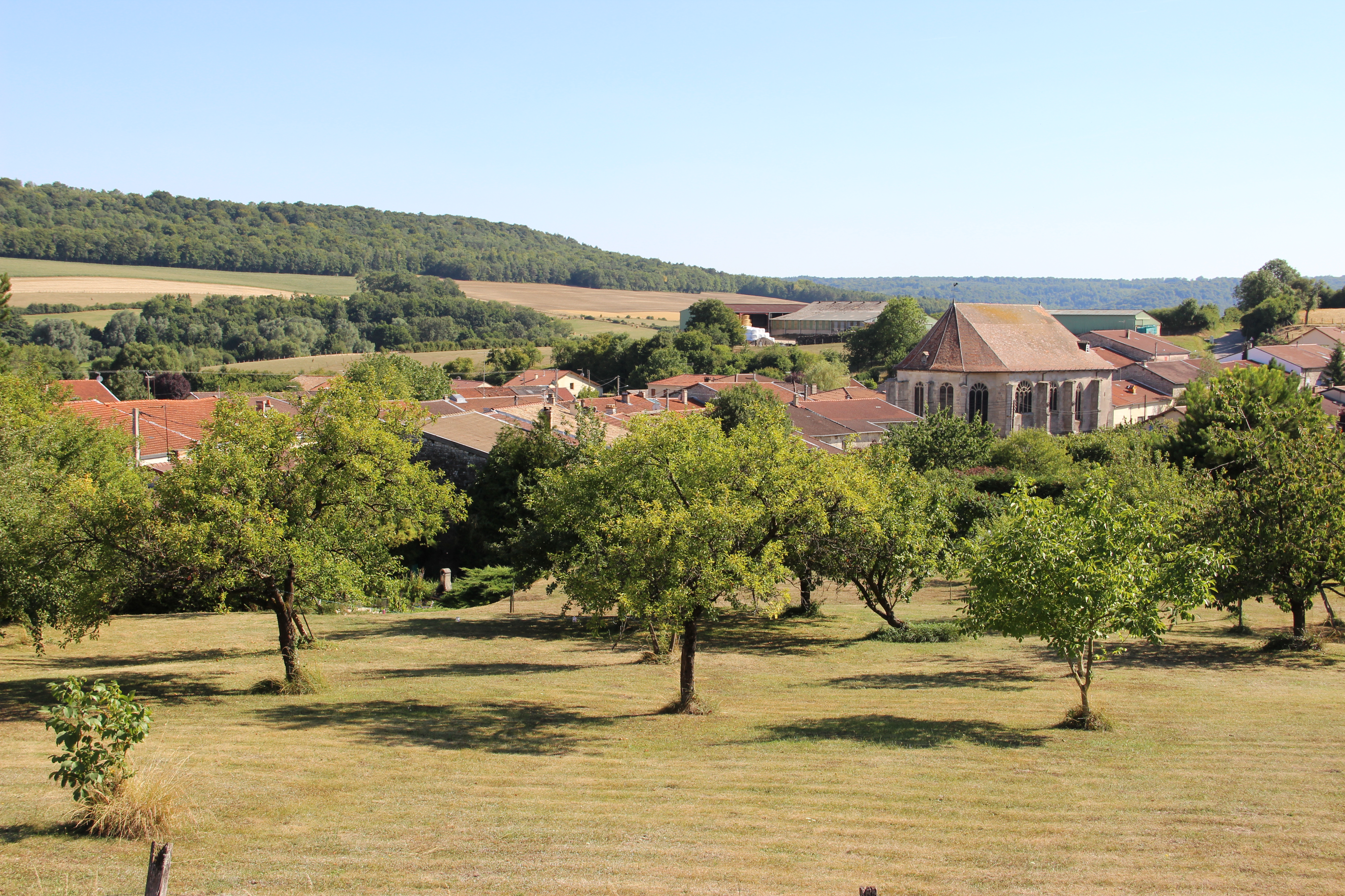 Vue d'ensemble du village de Culey